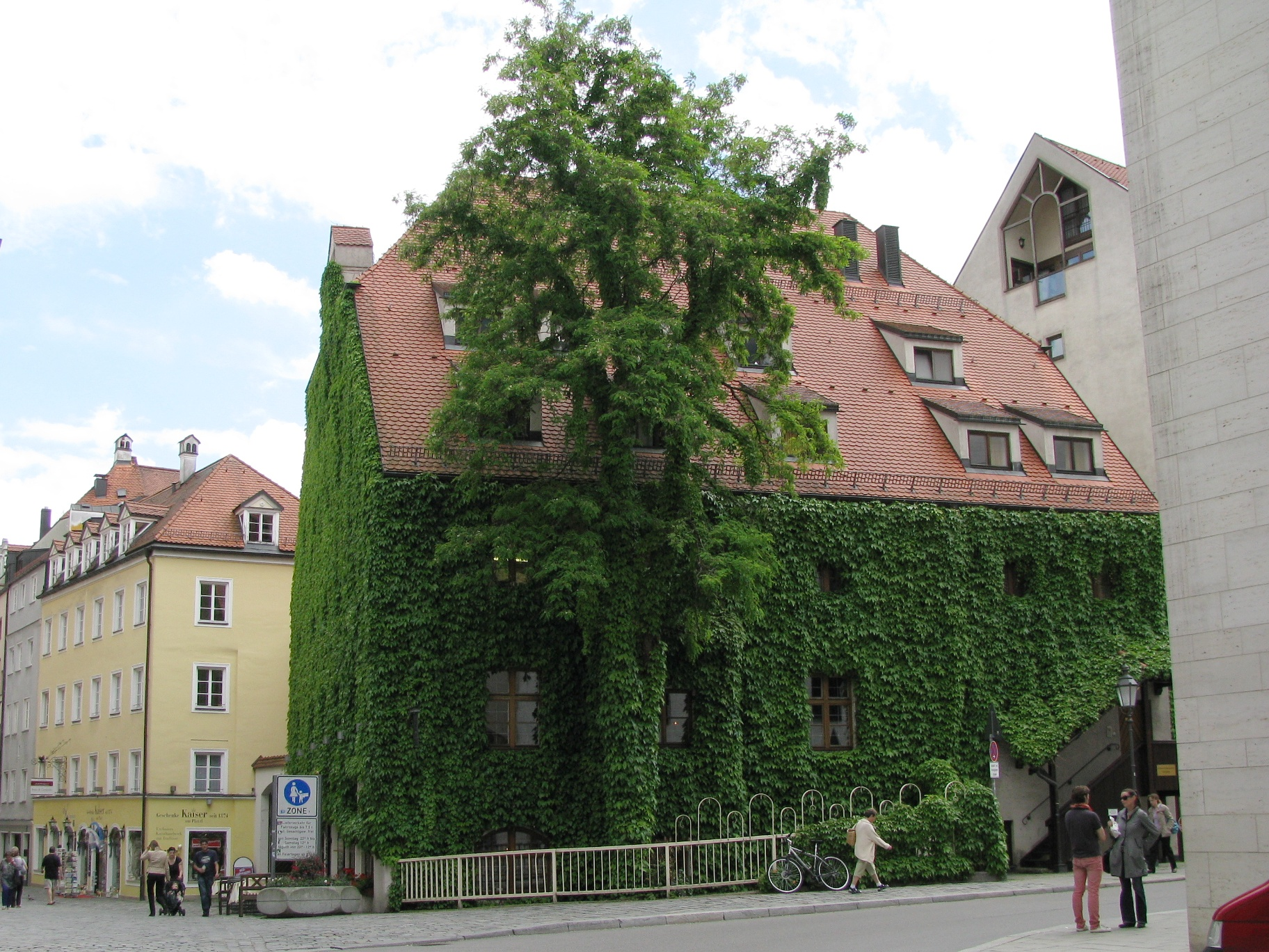 Pfistermühle in der Münchner Altstadt; Ansicht von Nordwest